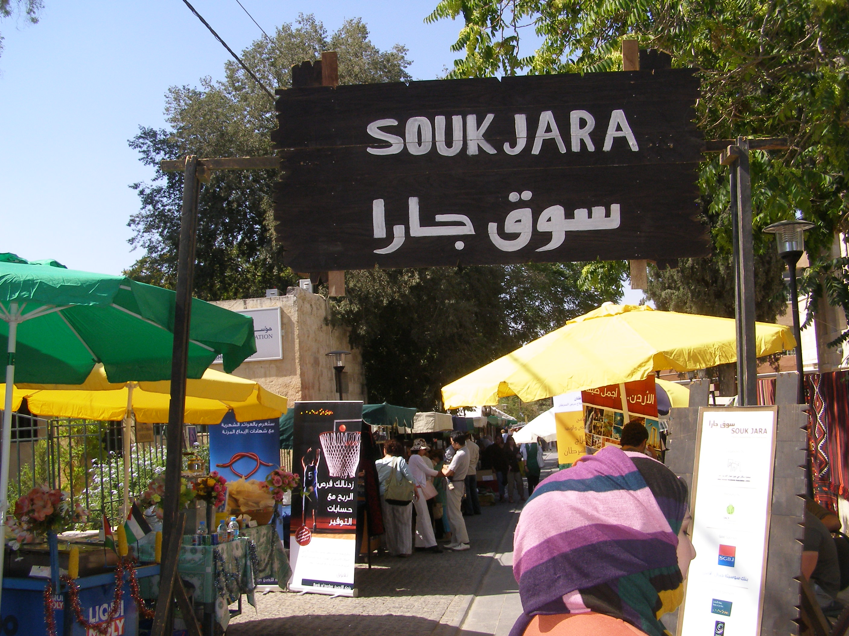 Souk Jara